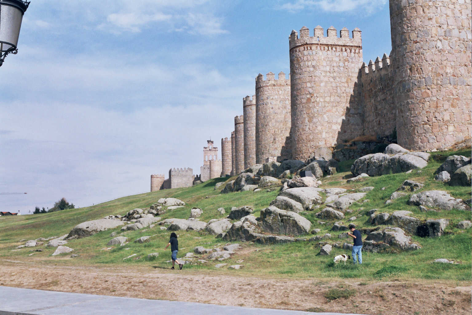 Ávila. (Castilla-León. España) Murallas. Fotografía realizada el 24 agosto de 2002 por el autor.User:Pelayo2